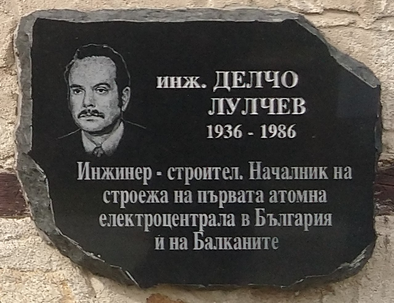 инж. Делчо Лулчев (1936-1986) - плоча в Исторически музей Панагюрище . Надпис: Инженер-строител. Началник на строежа на първата атомна електроцентрала в България и на Балканите